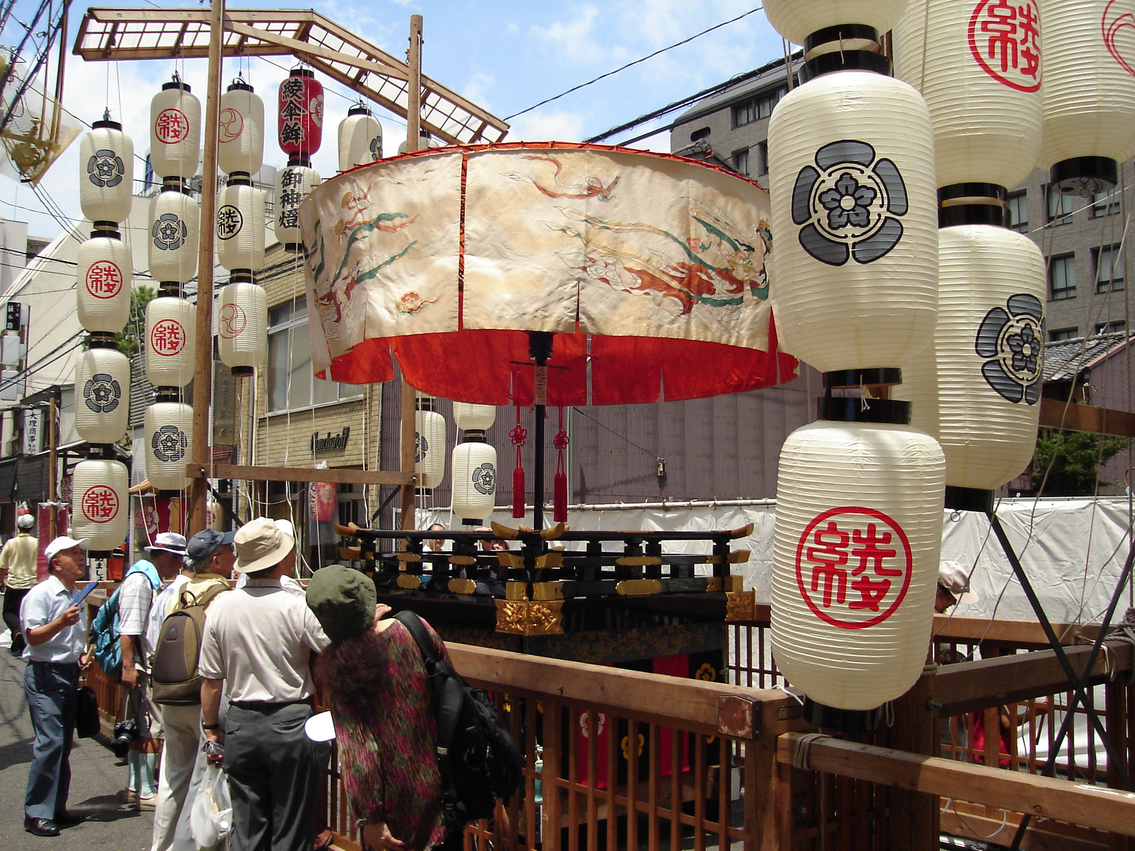 Ayagasa Boko(綾傘鉾)